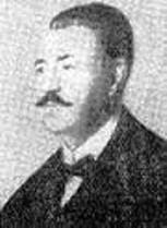 Tellyesniczky Kálmán magyar orvosdoktor, anatómus, egyetemi tanár.